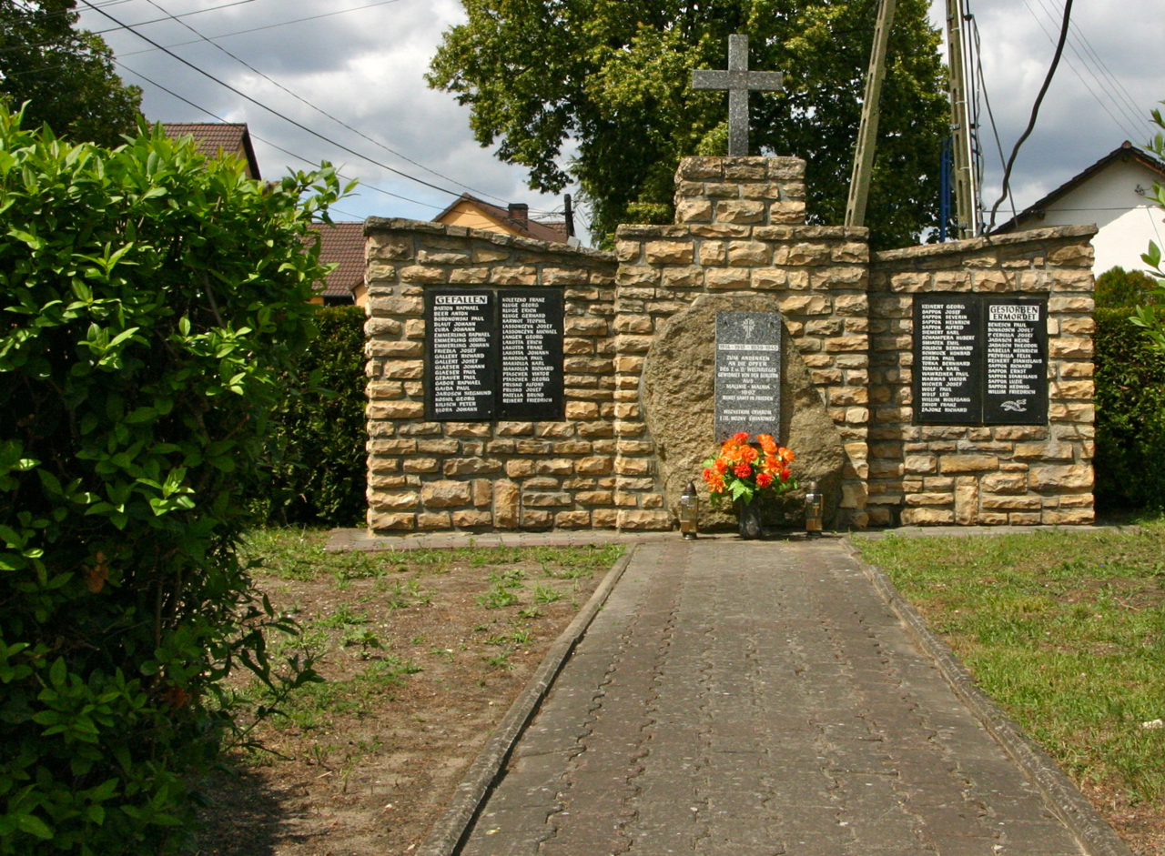 Malnia (dodatkowa nazwa w j. niem. Mallnie, 1936-45 Odergrund) – wieś w Polsce położona w województwie opolskim, w powiecie krapkowickim, w gminie Gogolin.